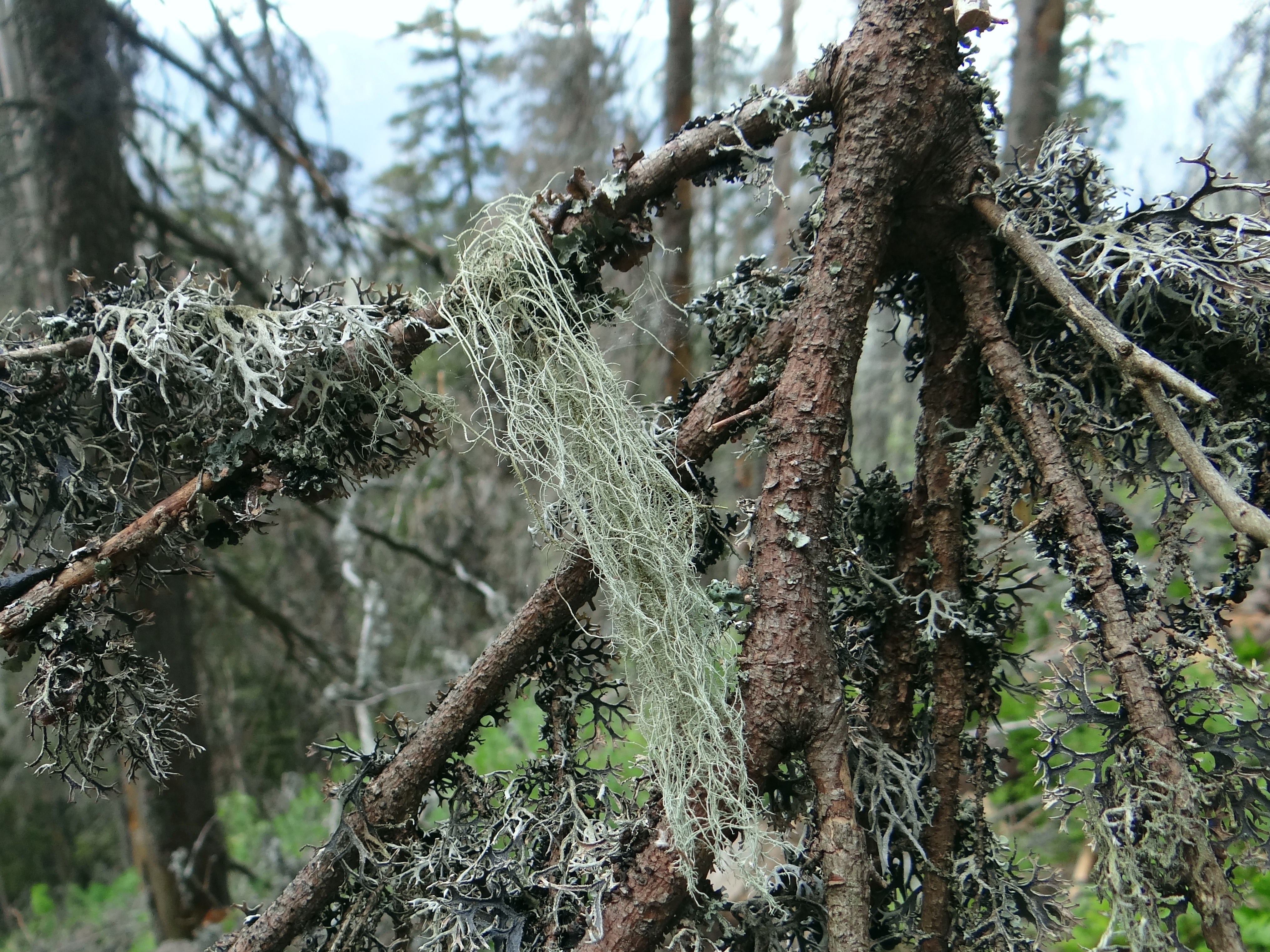 Usnea filipendula (habitat:Tatra Mountains, Dolina Tomanowa)